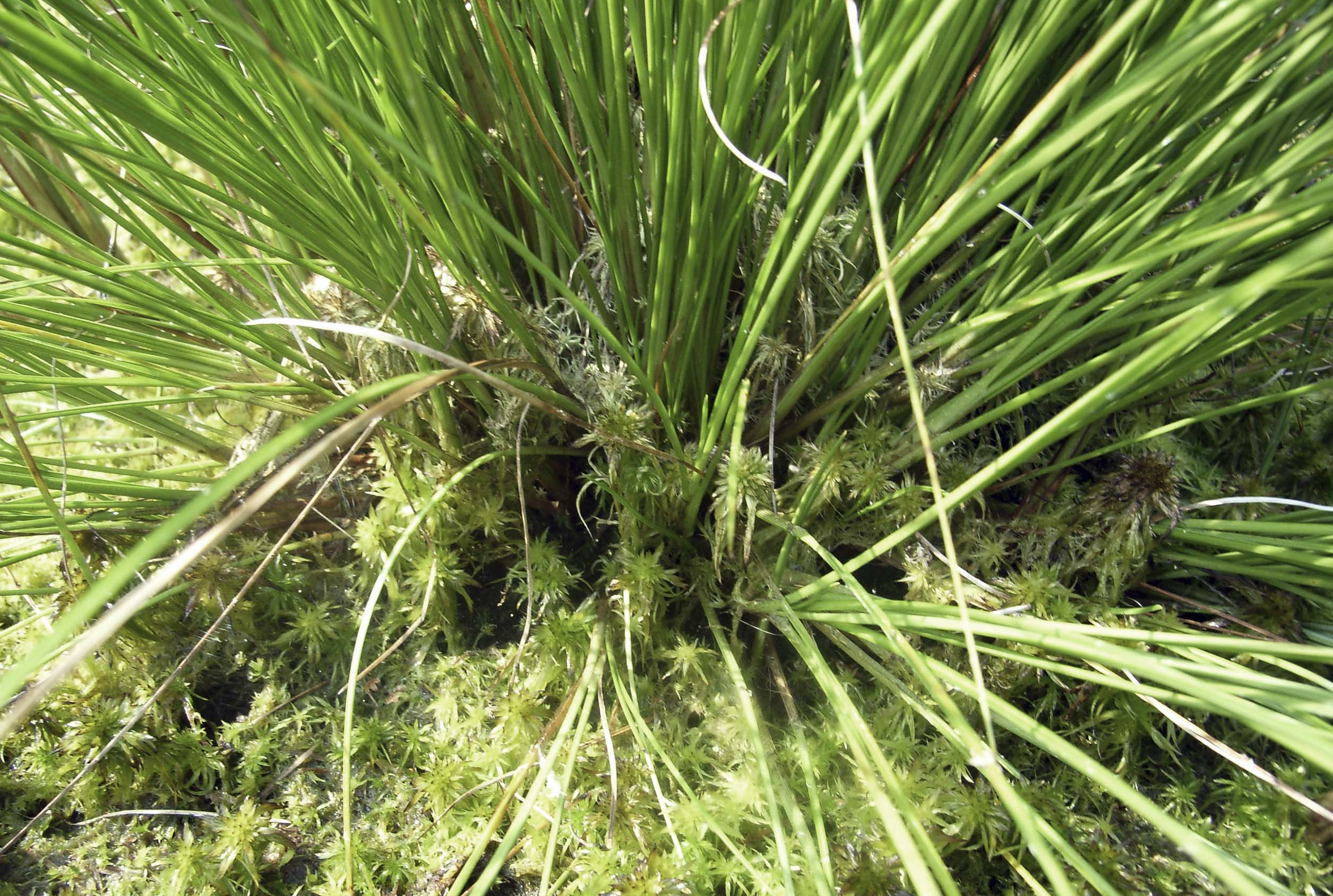 Horst des Scheiden-Wollgrases (Eriophorum vaginatum) in Torfmoosdecke, NSG Südlohner Moor, Niedersachsen